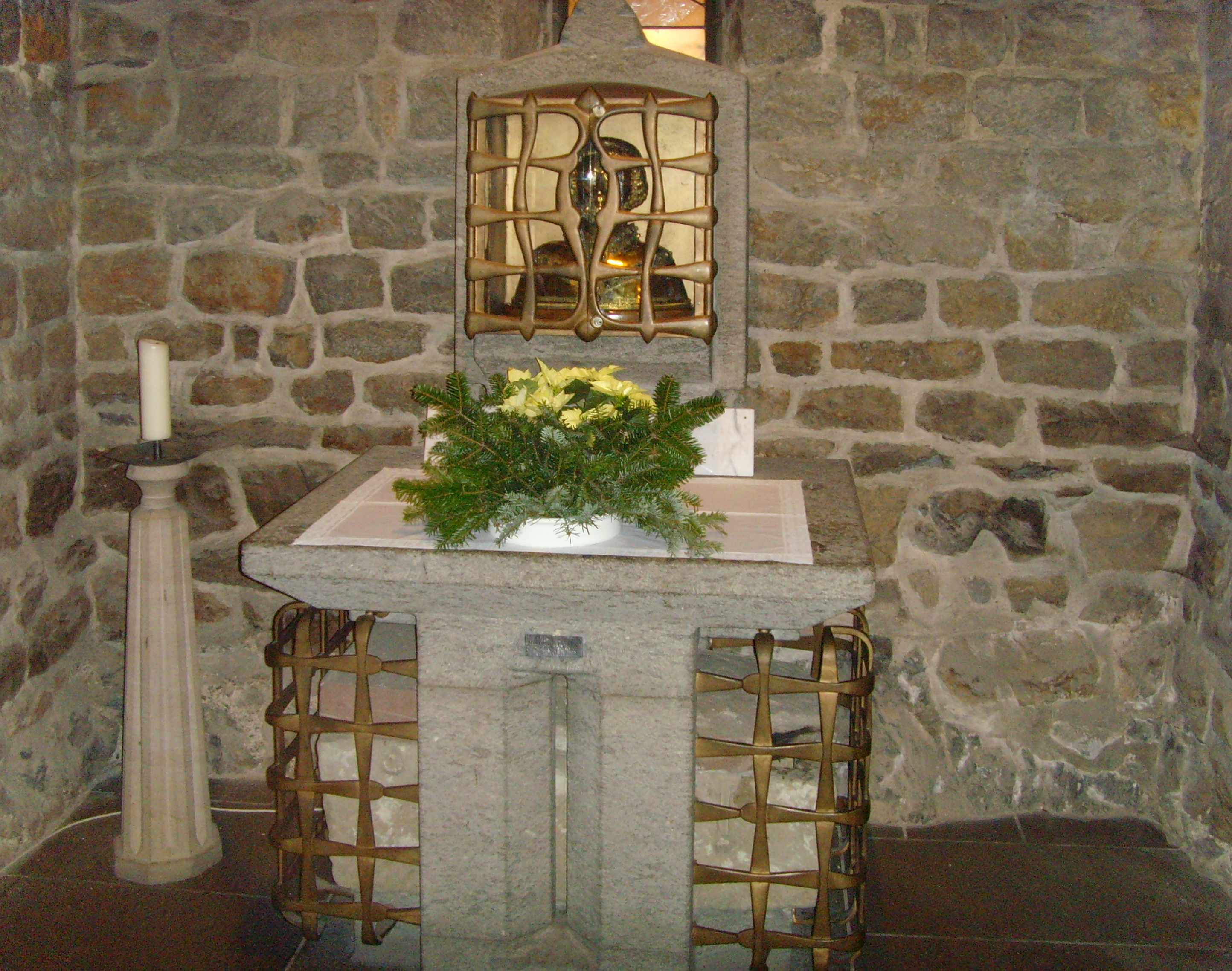 Sarkophag (unten, leer) und Kopf- bzw. Büstenreliquiar des St. Lubentius in der Lubentiuskapelle Dietkirchen